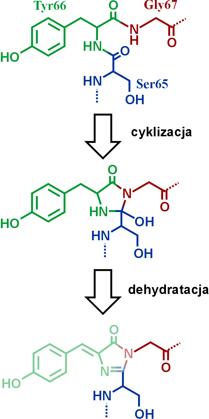 Powstawanie fluoroforu z aminokwasów wewnątrz białka GFP. Autor: Independovirus